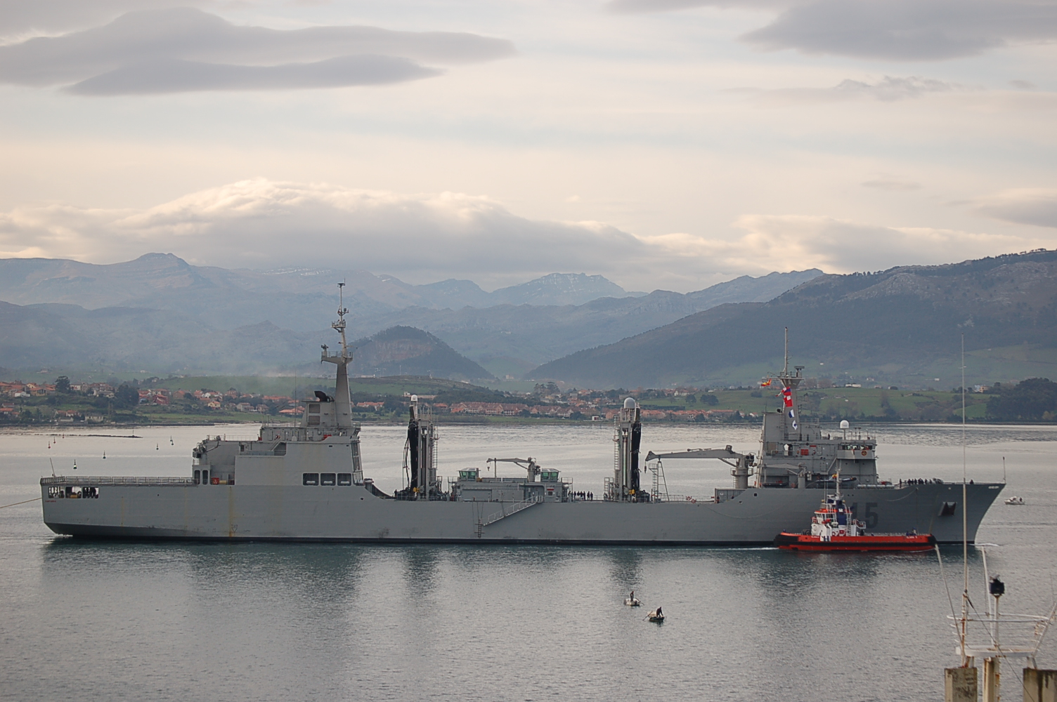 El buque Cantabria (A-15), de la Armada Española, bahía de Santander, foto tomada el 24 de Marzo de 2011